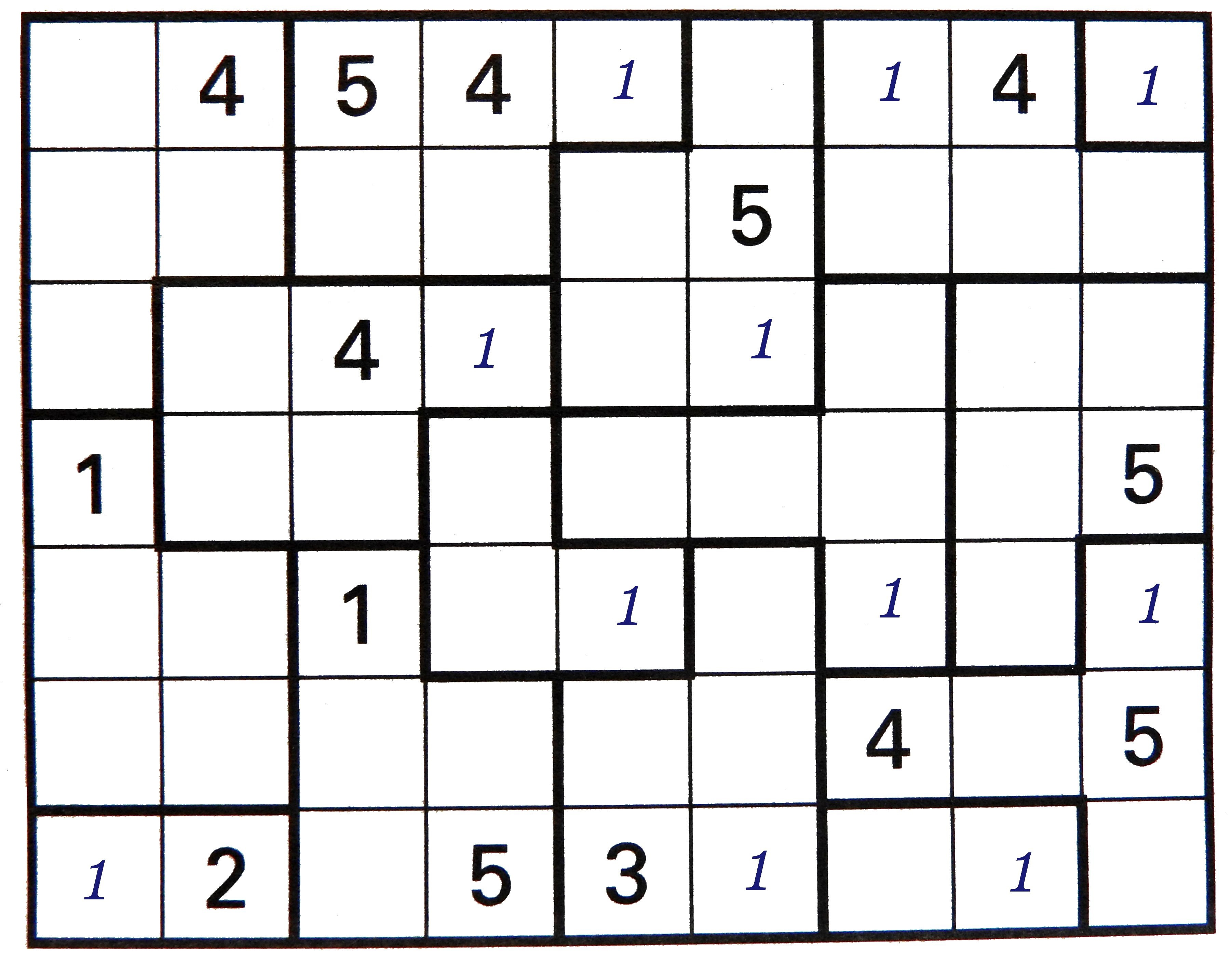 Eerste invulling met zekere plaatsen getal 1.